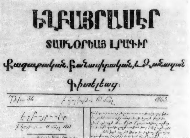 Եղբայրասէր լրագիր